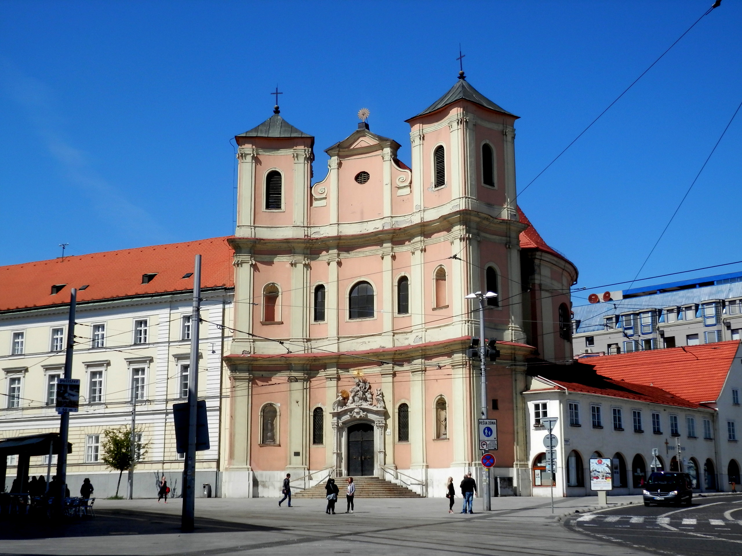 Hurbanovo námestie. Bratislava.